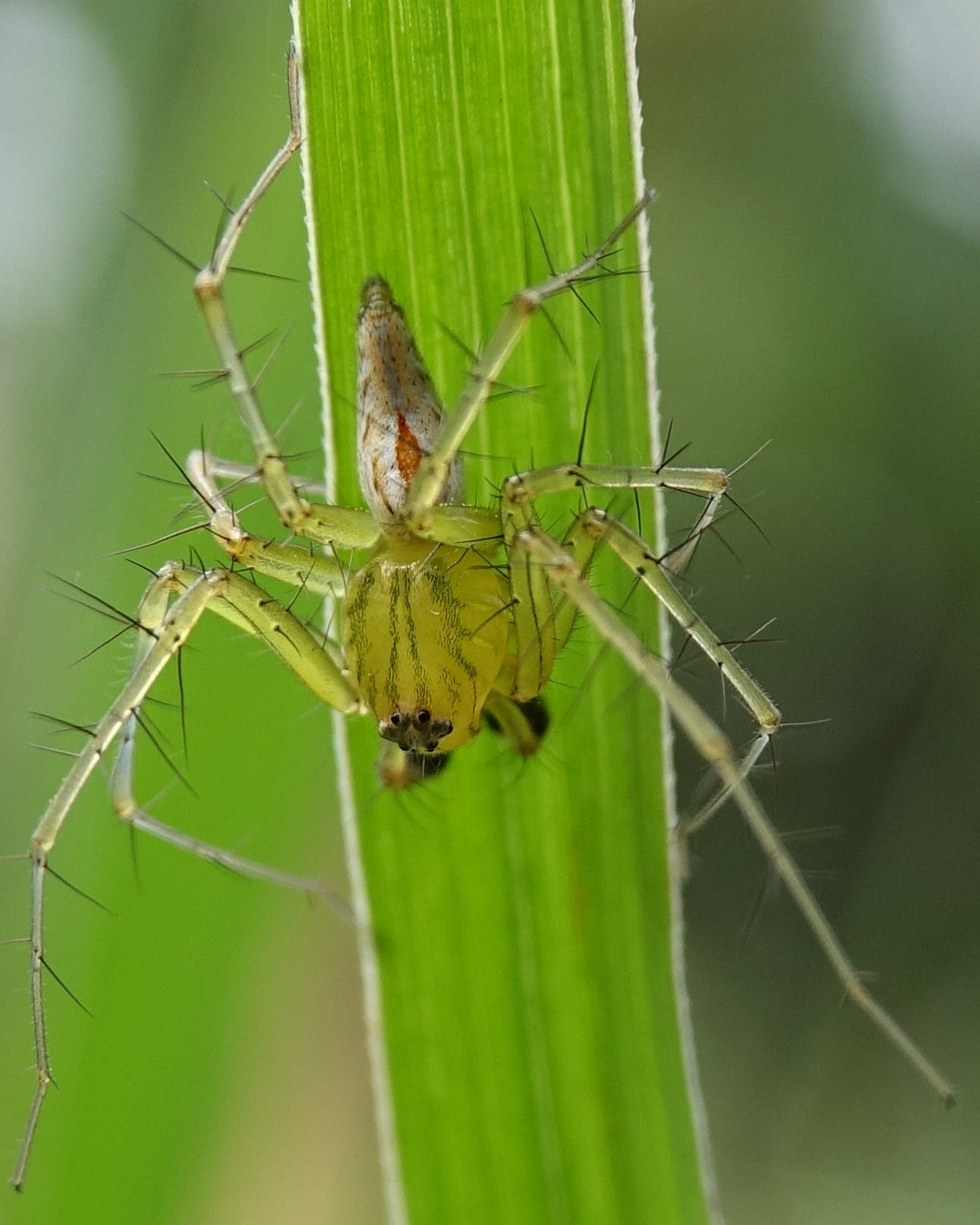 ササグモのオス 頭胸部より腹部が小さいことがオスの特徴である。 日本・東海地方